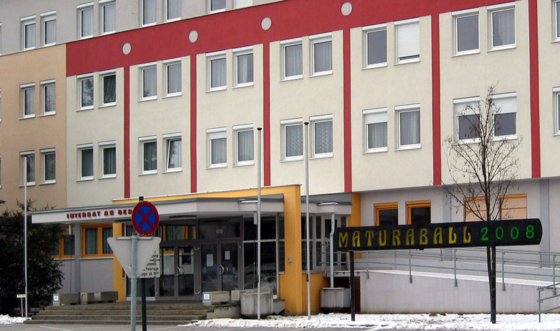 Internat HTBL in Pinkafeld, Burgenland, Austria